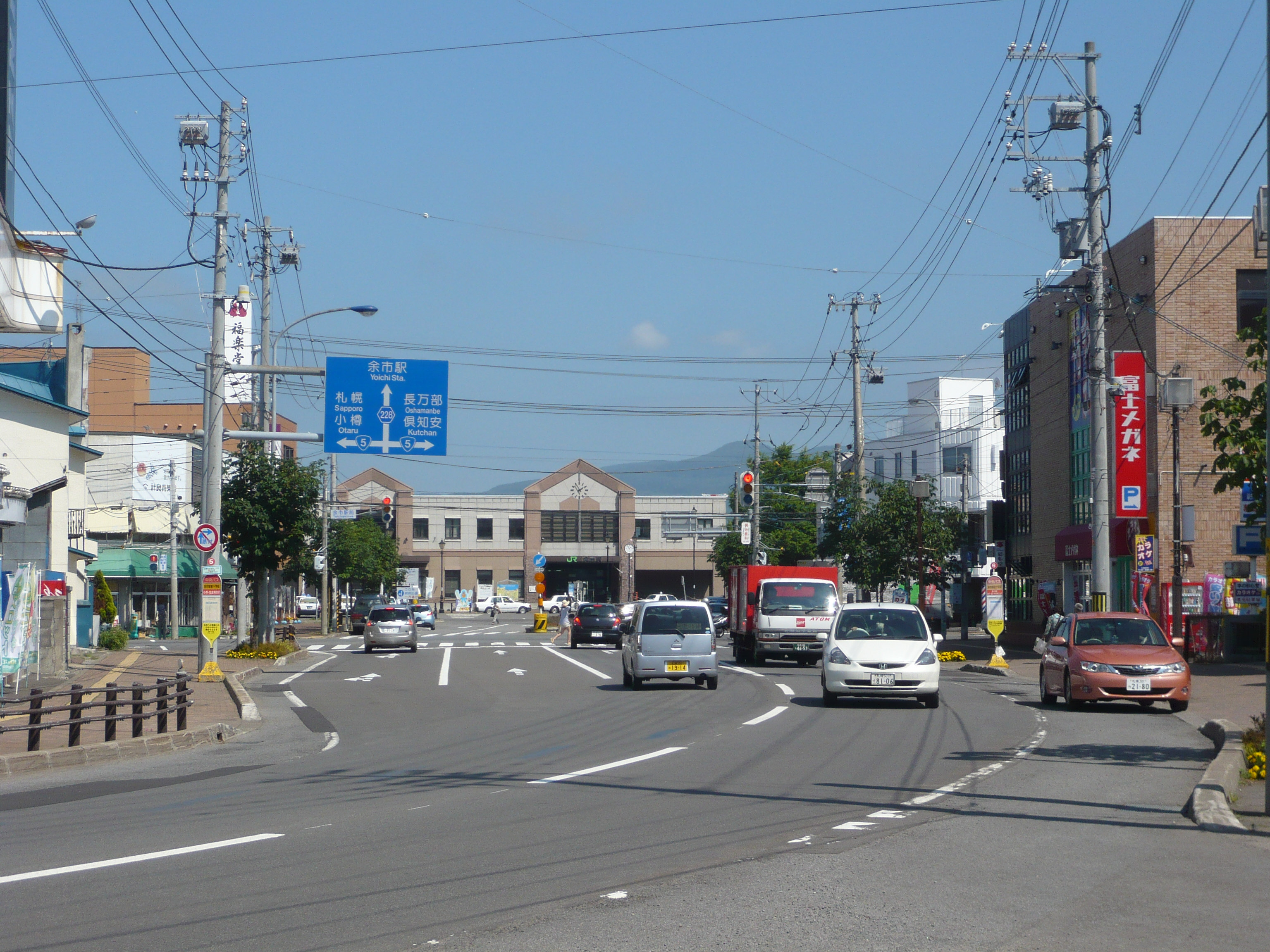 余市駅前の街並み